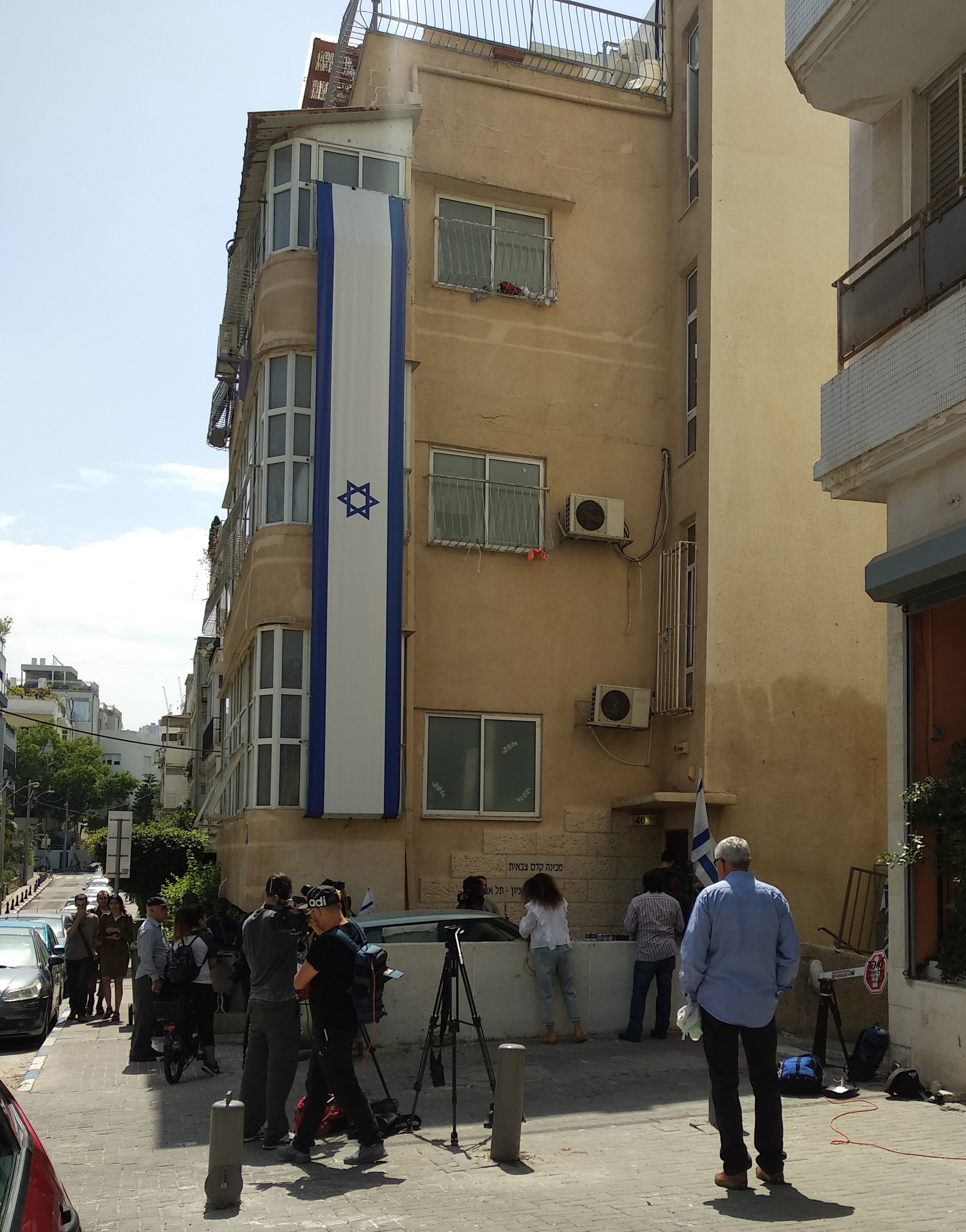 אנשי תקשורת וסקרנים בפתח המכינה הקדם-צבאית בני ציון, למחרת האסון בנחל צפית